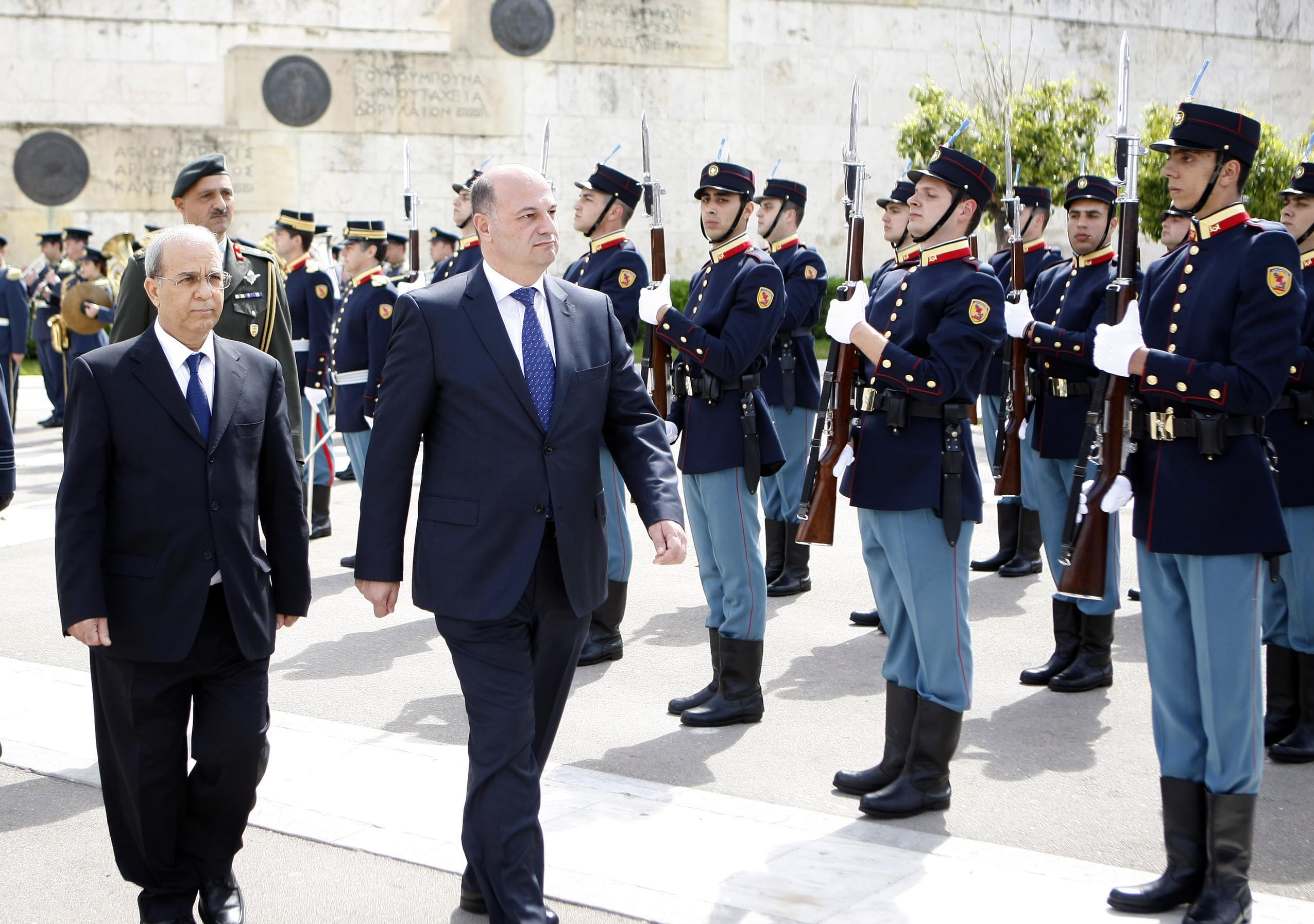 Την Κυριακή 31 Μαρτίου, ο Υφυπουργός Εξωτερικών Κωνσταντίνος Τσιάρας εκπροσώπησε την ελληνική κυβέρνηση στη Δοξολογία που εψάλη στον Ι.Ν. Αγ. Διονυσίου του Αρεοπαγίτη, για την εθνική επέτειο της 1ης Απριλίου 1955, ημέρα έναρξης του Κυπριακού Απελευθερωτικού Αγώνα.